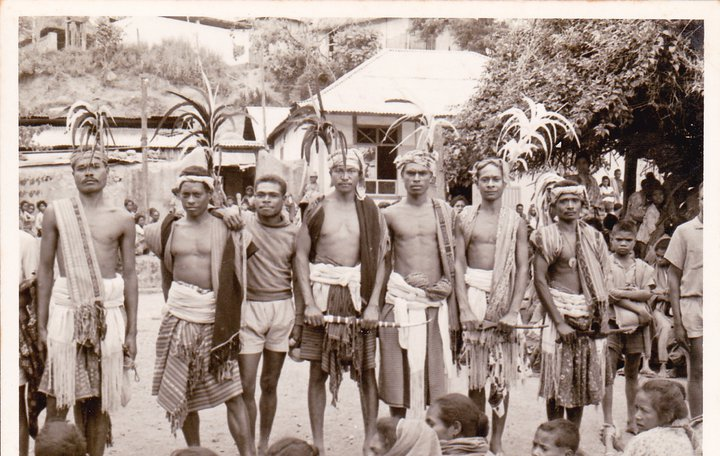 Os "moradores" eram uma tropa de 2ª linha